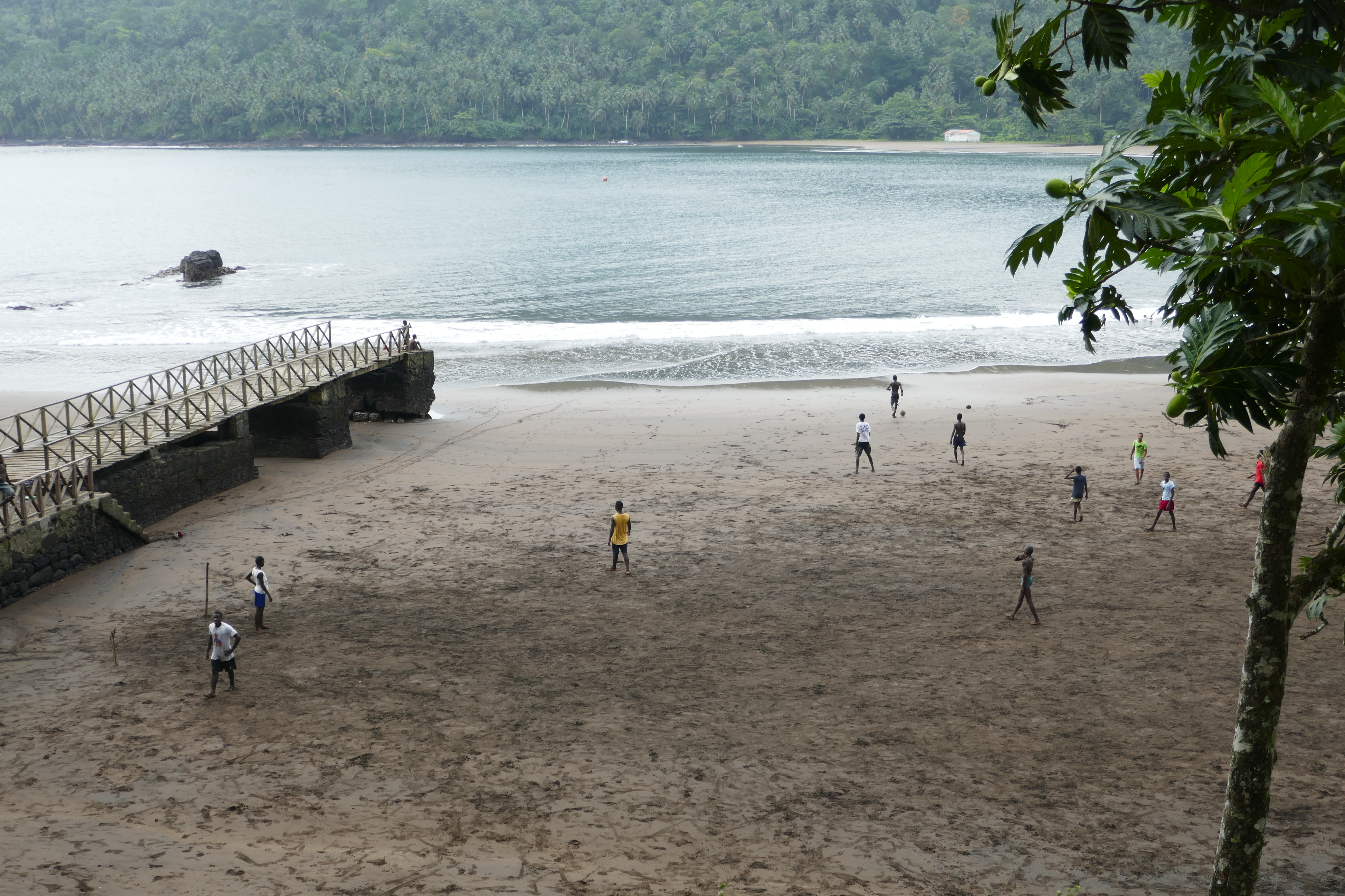 Football sur une plage de São João dos Angolares au sud-est de l'île de São Tomé This is an image with the theme "Play" from: Sao Tome and Principe